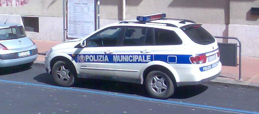 una Kyron della Polizia Municiaple di Avellino